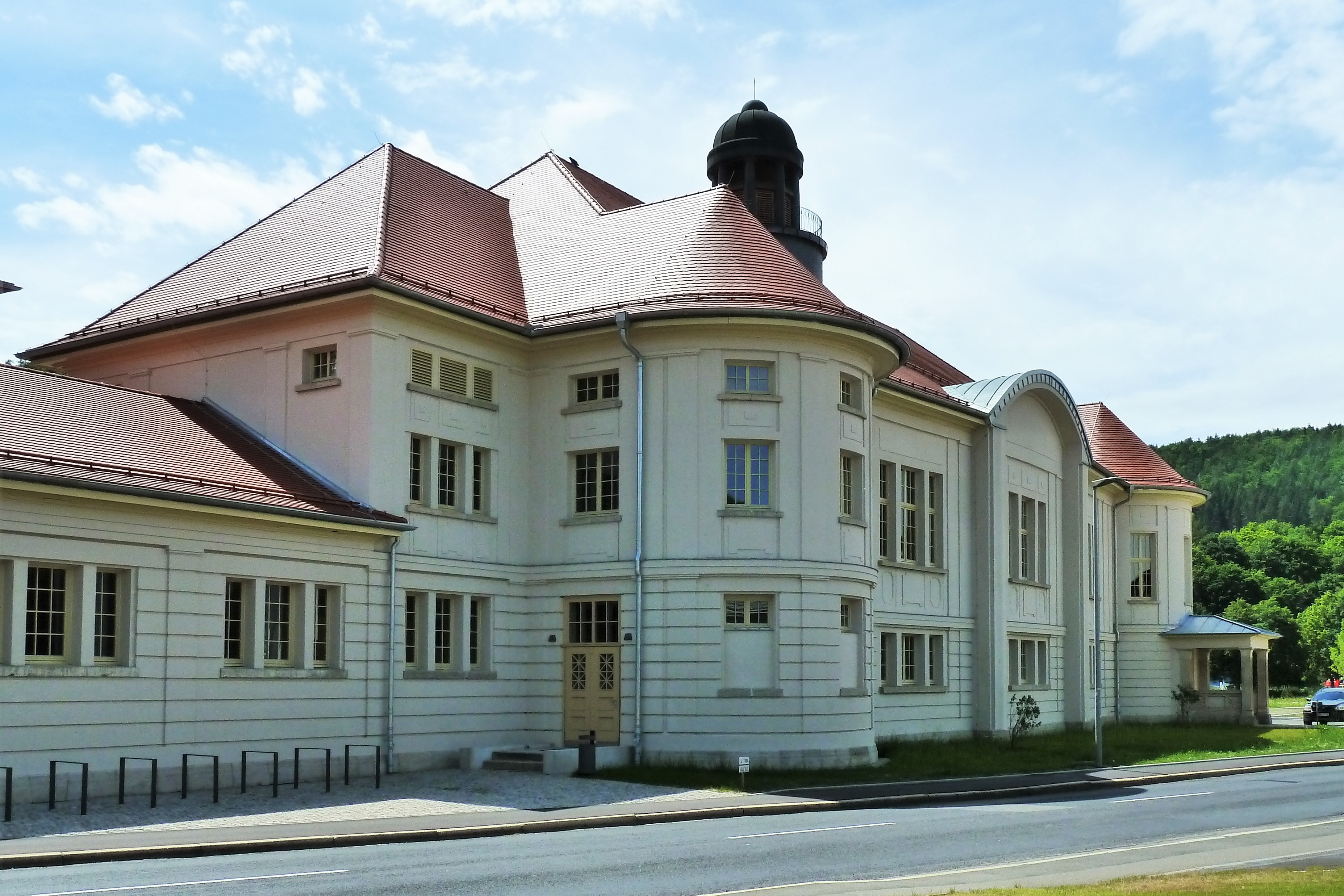 Volkshaus Meiningen - Großer Volkshaussaal, erbaut 1913, saniert 2018.